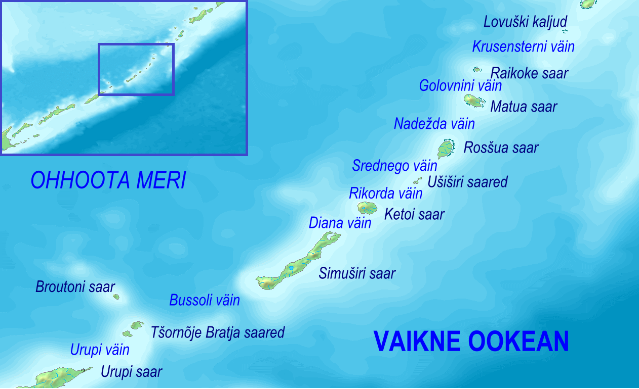 Kuriilide keskosa kaart